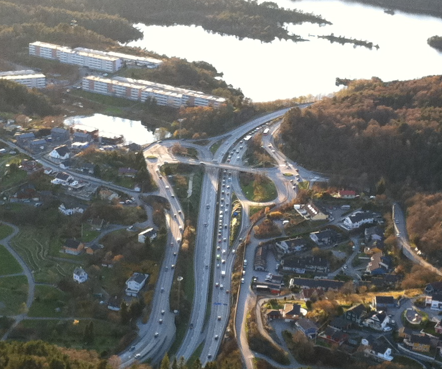 Trafikkmaskin mellom Lyderhornstunnelen og Storavatn